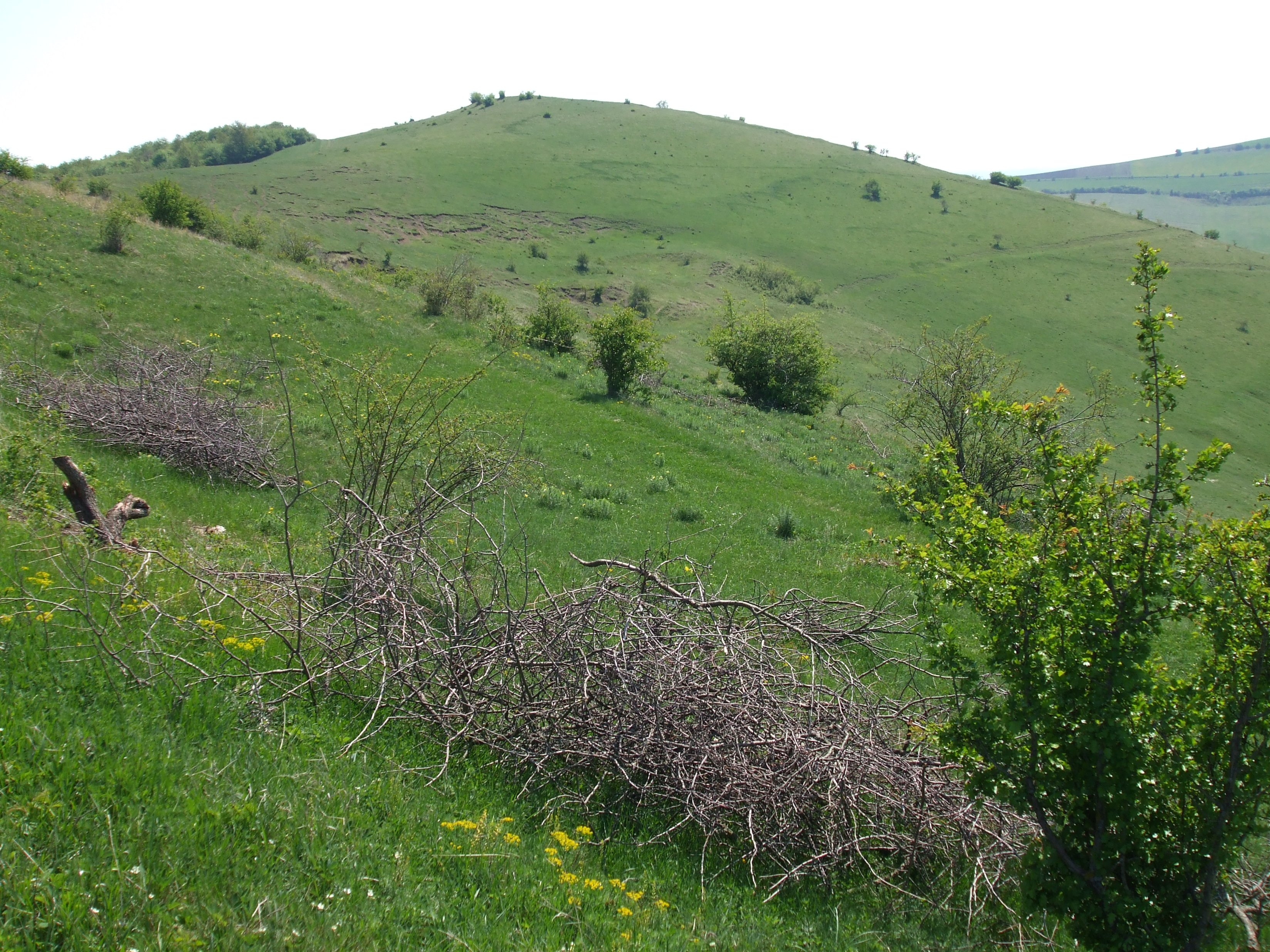 Aruncuta - Dealul "Tigla Fratii", cu o inaltime de 526 m. Este cel mai inalt punct al satului.